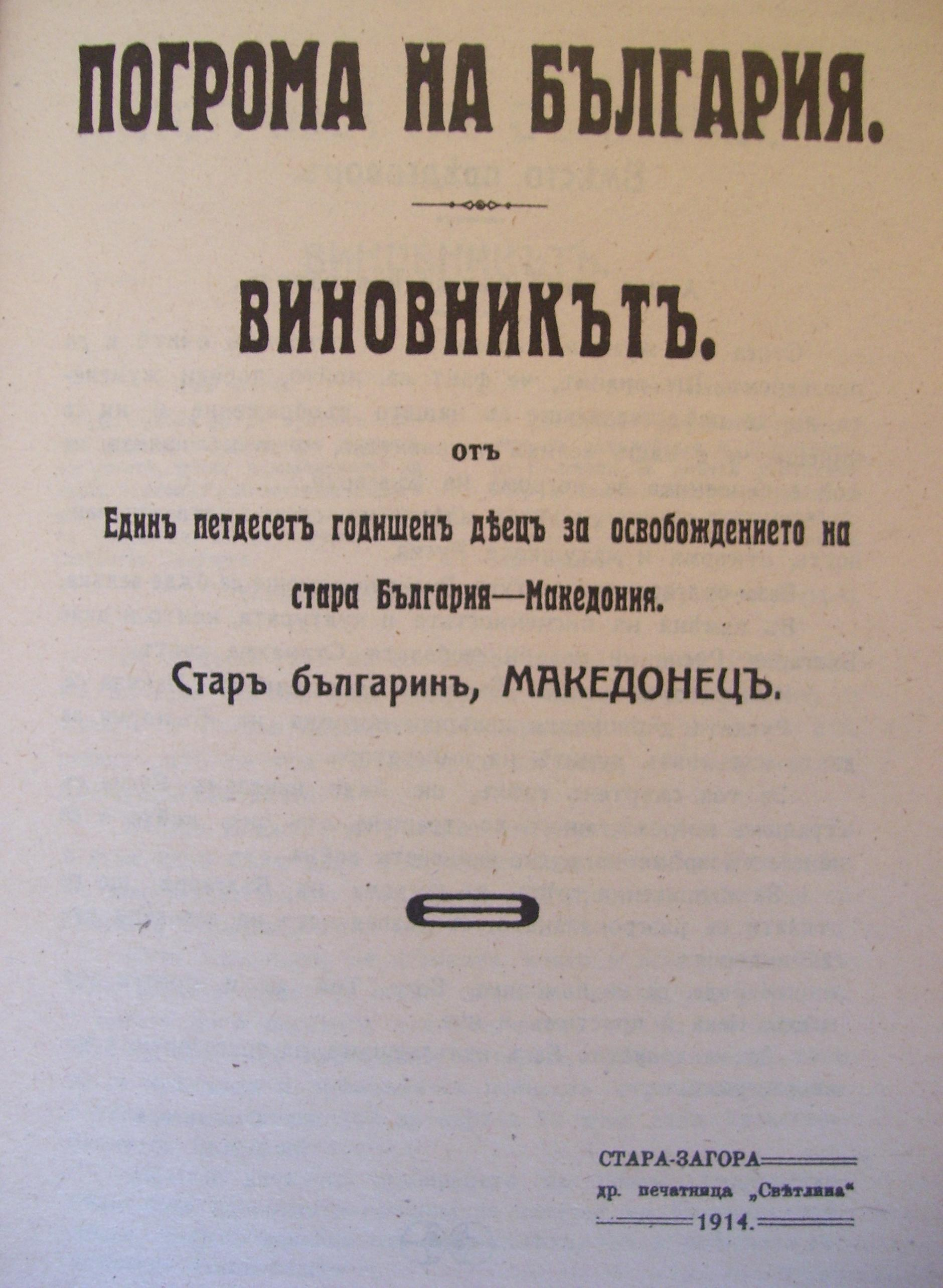 Корица на "Погрома на България" на старозагорския митрополит Методий Кусев.